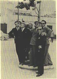 Comitato per i festeggiamenti in onore di santa Fara. Da sinistra: Leonardo Pandolfo, Cesare Manzella, Luigi e Masi Impastato, Sarino e Gaetano Badalamenti.